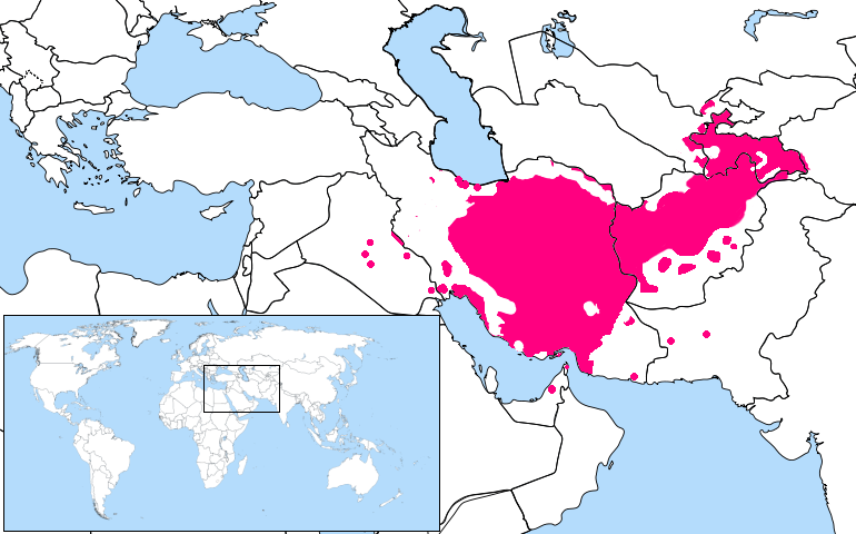 تۆرکجه: فارسلارین یاشادیغی اراضیلری، البته توجه ائلیین کی چؤل‌لر و سکنه‌دن بوش اولان اراضیلرده فارسلارین یاشادیغی اراضیلرینه آرتیریلیب، و اونلارین یاشادیق یئرلری اوستونده و فارسلارین نفعینه حیساب اولوب.